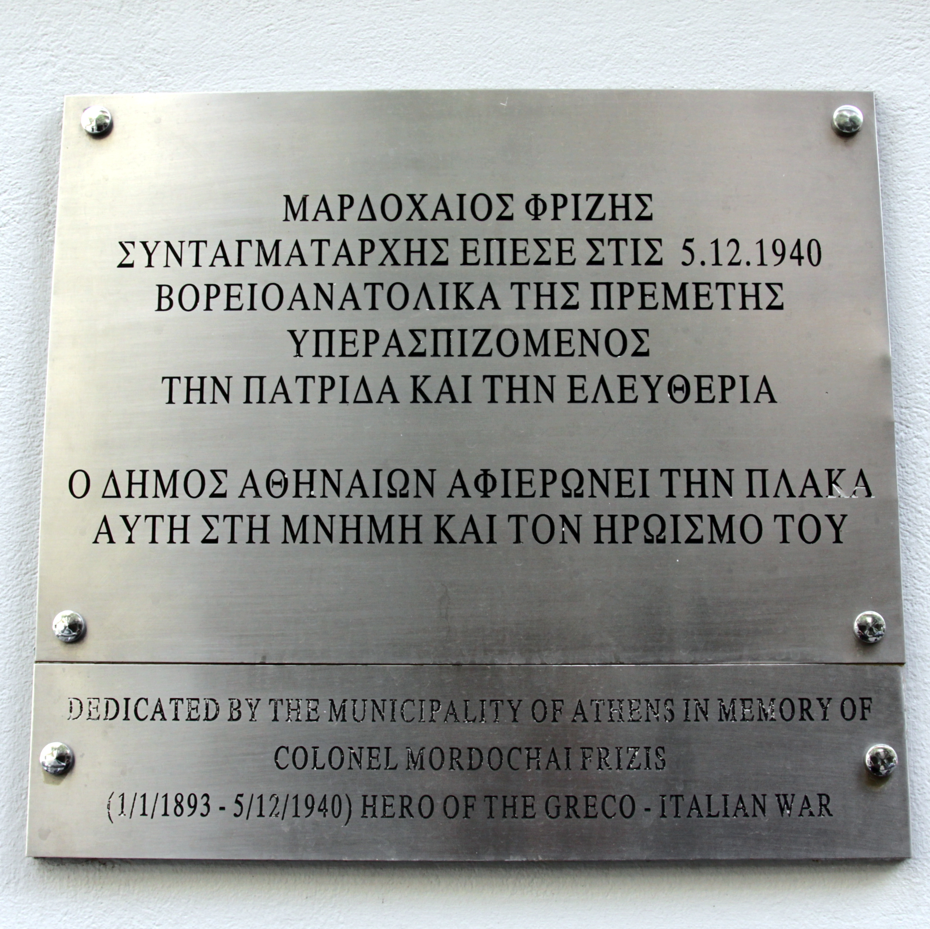 Colonel Mordochai Frizis (1/1/1893 - 5/12/1940), Hero of the Greco - Italian war. This building hosts the Jewish Museum of Greece (Athens) --- "Μαρδοχαίος Φρίζης. Συνταγματάρχης έπεσε στις 5.12.1940 Βορεοανατολικά της Πρεμέτης υπερασπιζόμενος την πατρίδα και την ελευθερία. Ο Δήμος Αθηναίων αφιερώνει την πλάκα αυτή στη μνήμη και τον ηρωισμό του." Η πλάκα αυτή βρίσκεται στο κτίριο που στεγάζει το Εβραϊκό Μουσείο της Ελλάδος. (Αθήνα).